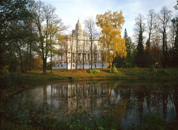 ПАРК. ВИД В ПАРКЕ. ОСЕНЬ. КАТАЛЬНАЯ ГОРКА